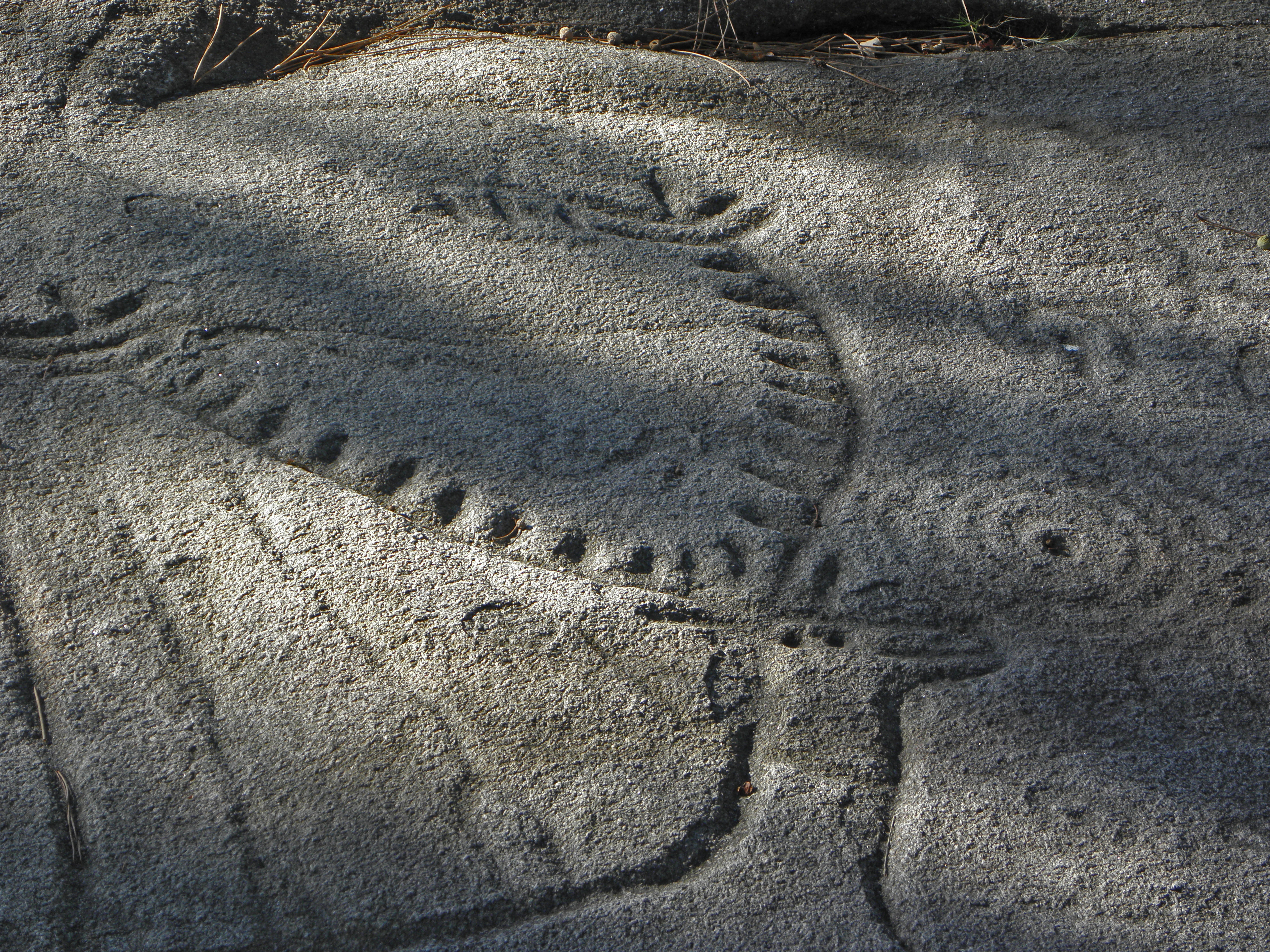 Campo Lameiro